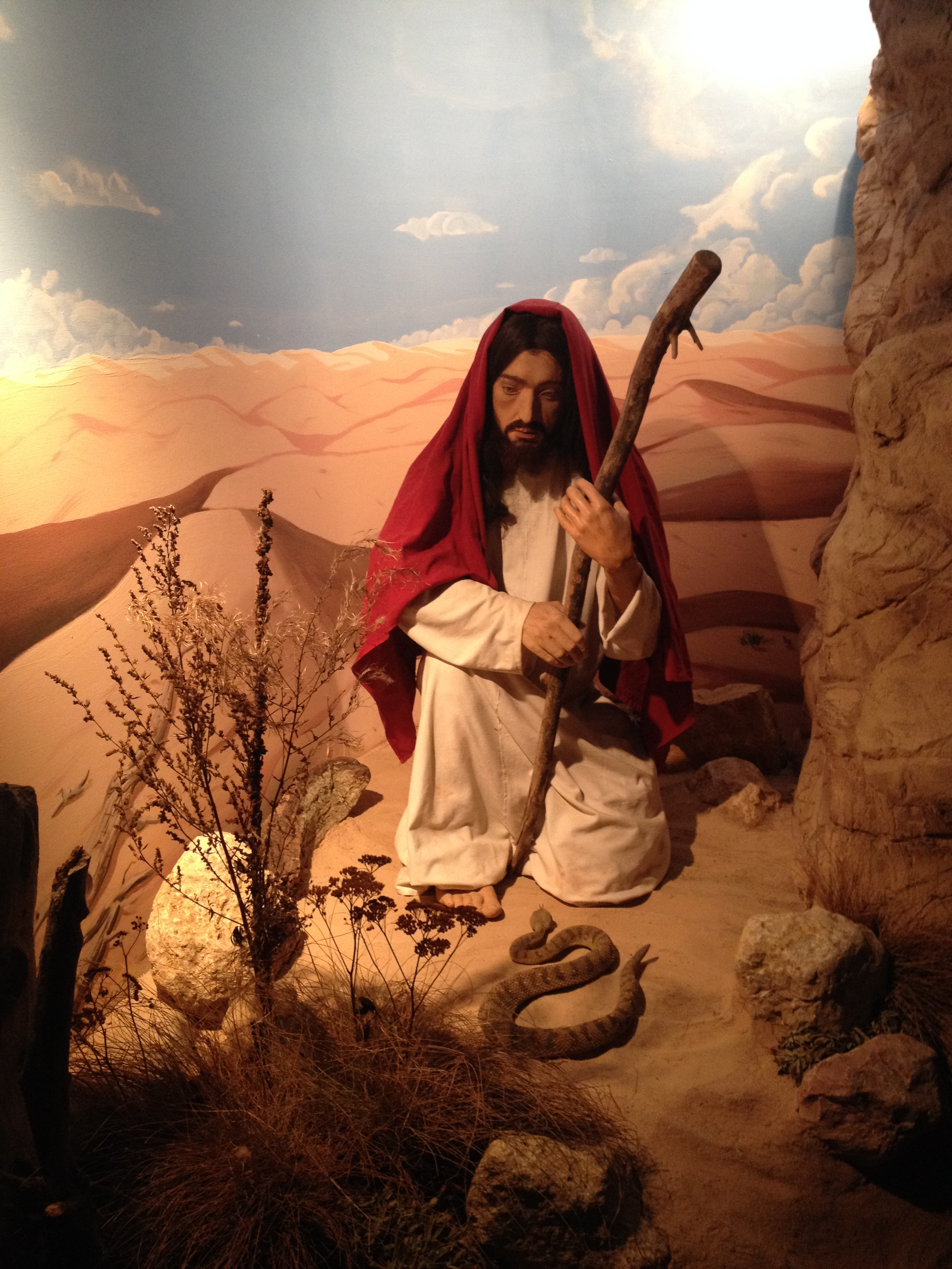 Gesù, pieno di Spirito Santo, si allontanò dal Giordano e fu condotto dallo Spirito nel deserto dove, per quaranta giorni, fu tentato dal diavolo.